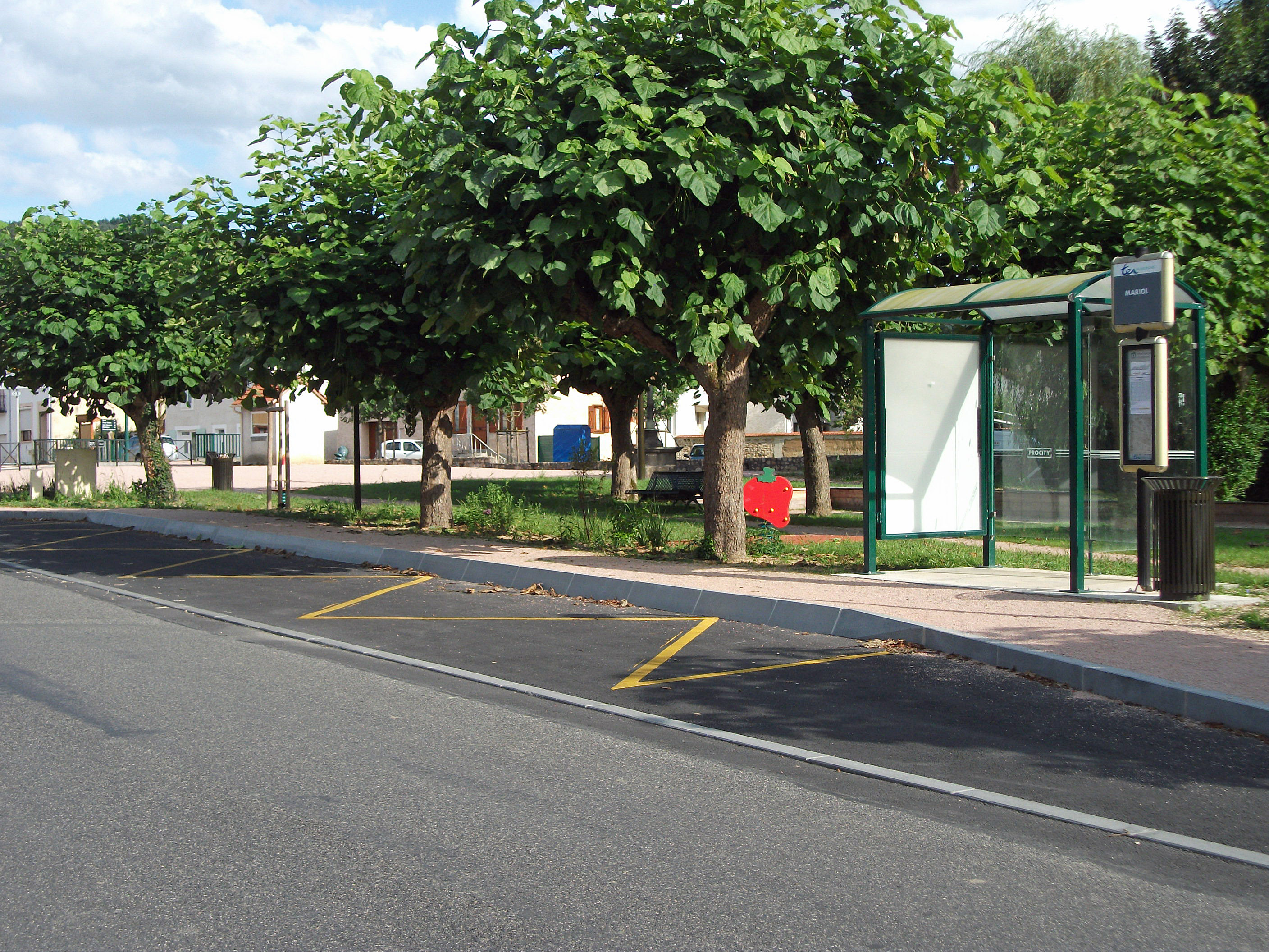 Arrêt des autocars (TER et scolaires) à Mariol